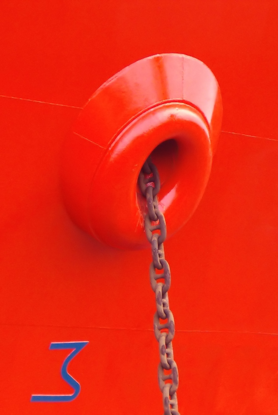 Kluza statku wodnego